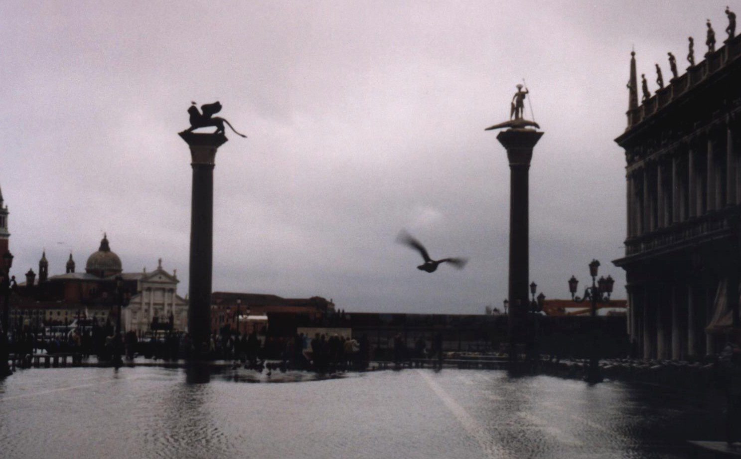 Acqua alta in Venice